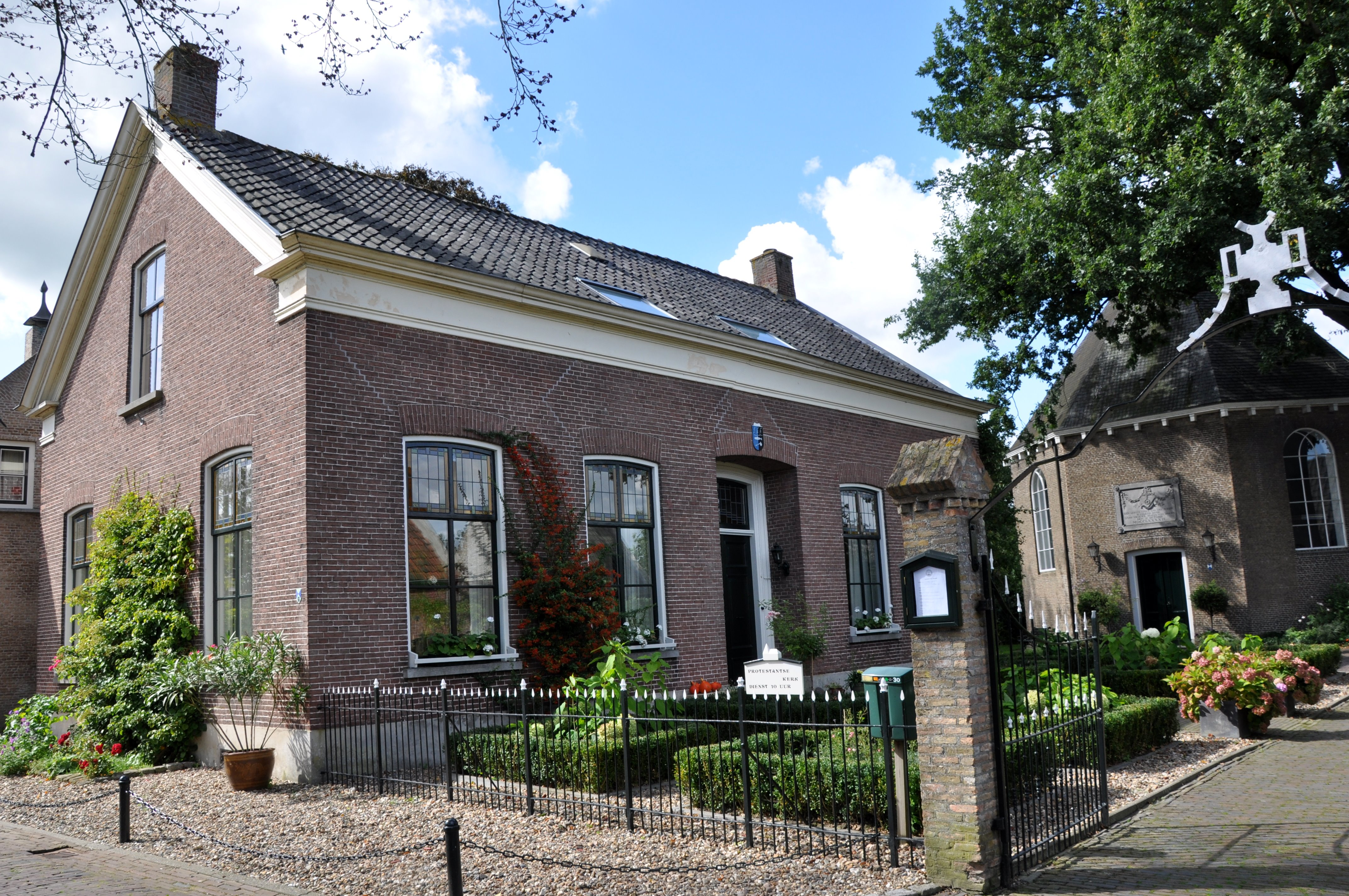 DSC_0046 Pastorie bij Prot. Kerk, Herengracht, Drimmelen, rm 28096